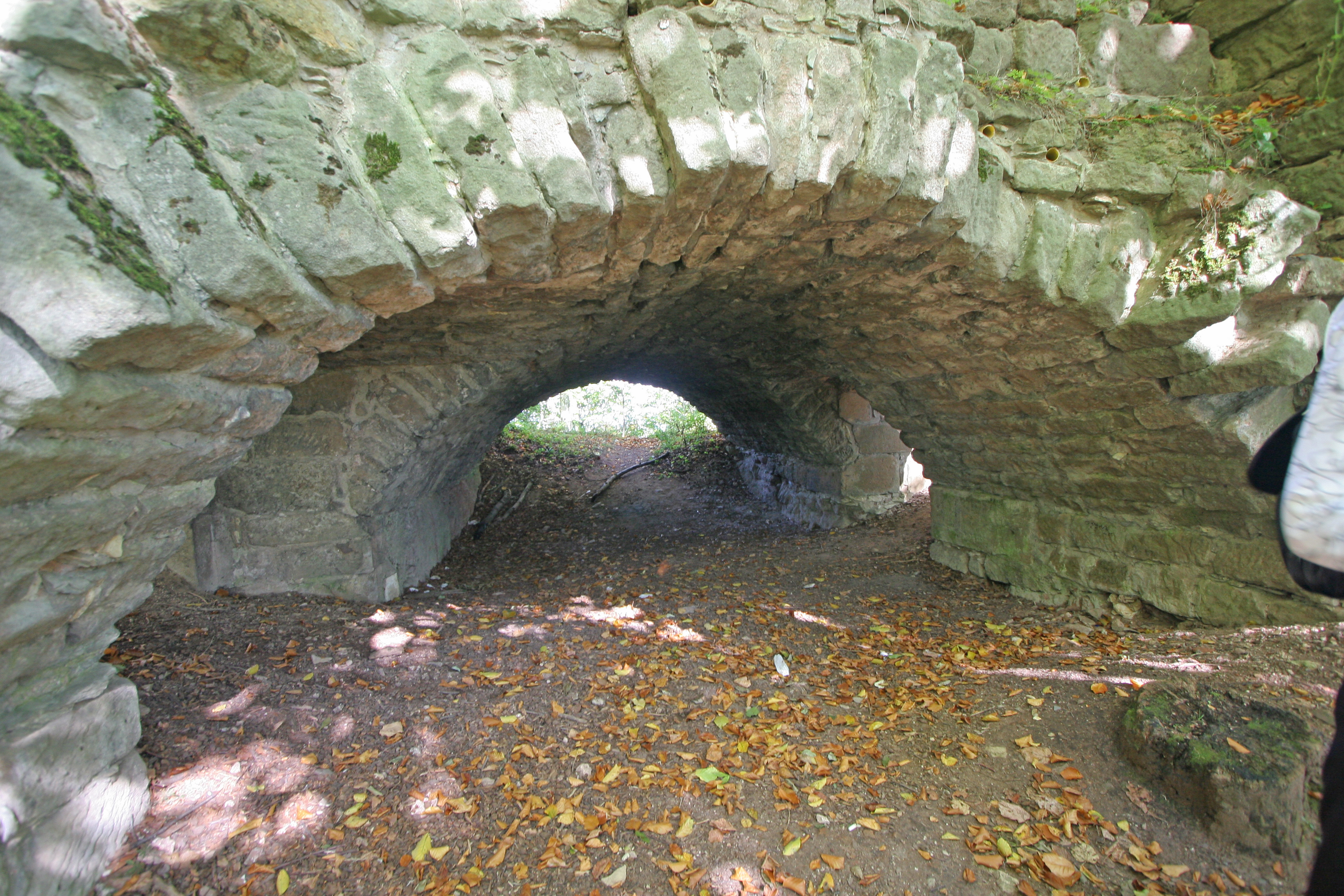 Hrad - Žampach a Chudoba, zřícenina (Žampach), Žampach